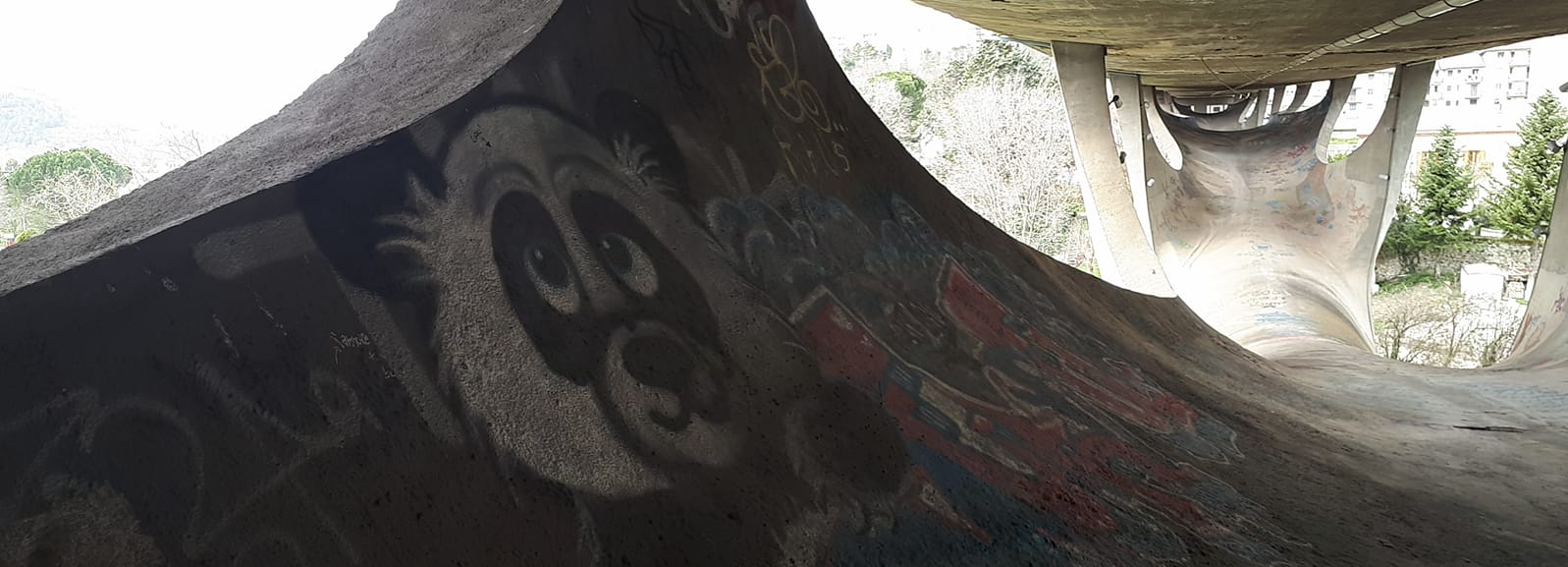 L'interno del ponte.